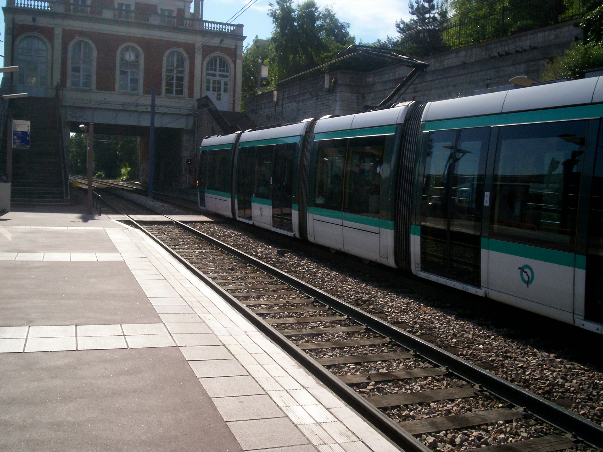 Paris Tramway T2